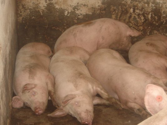 Cerdos descansando, Finca, Antioquia, Colombia